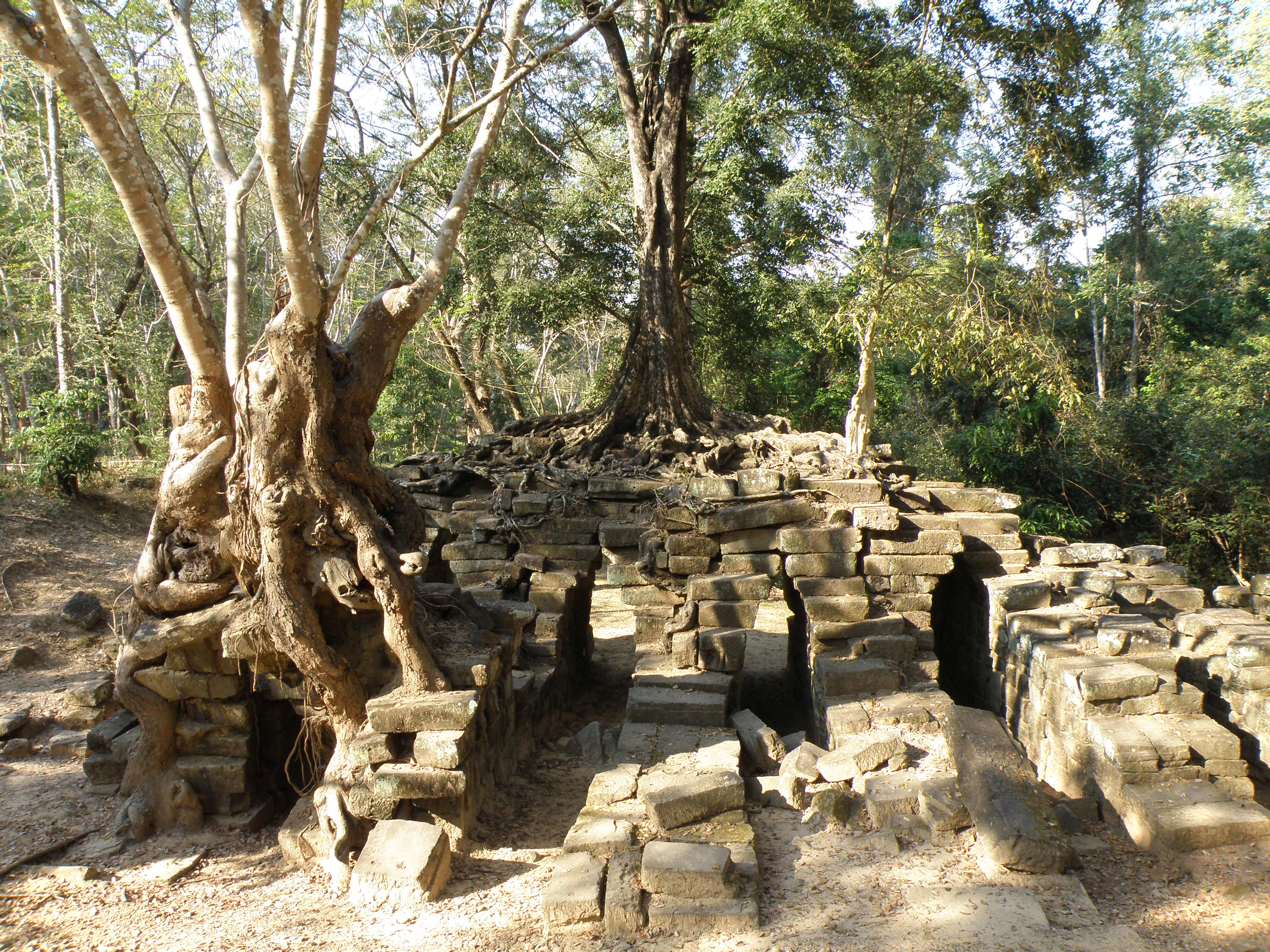 Speam Thma - Pont post angkorien à Siem Reap - Cambodge